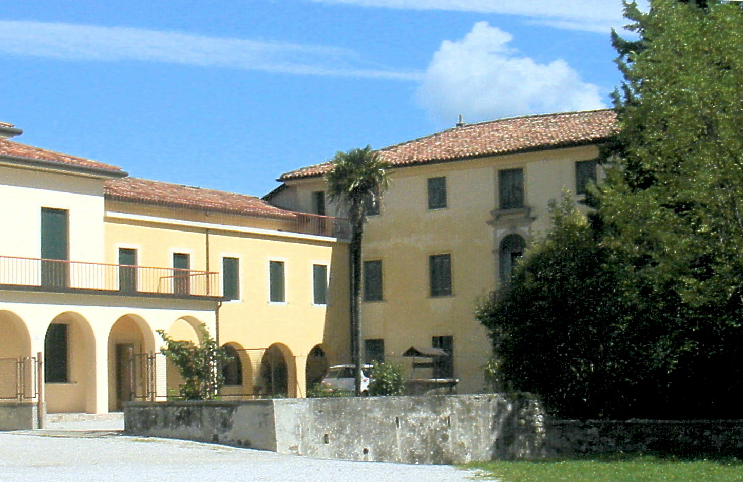 Colle Umberto (Treviso, Italia): Villa San Tommaso (XVIII sec.), canonica della chiesa parrocchiale.